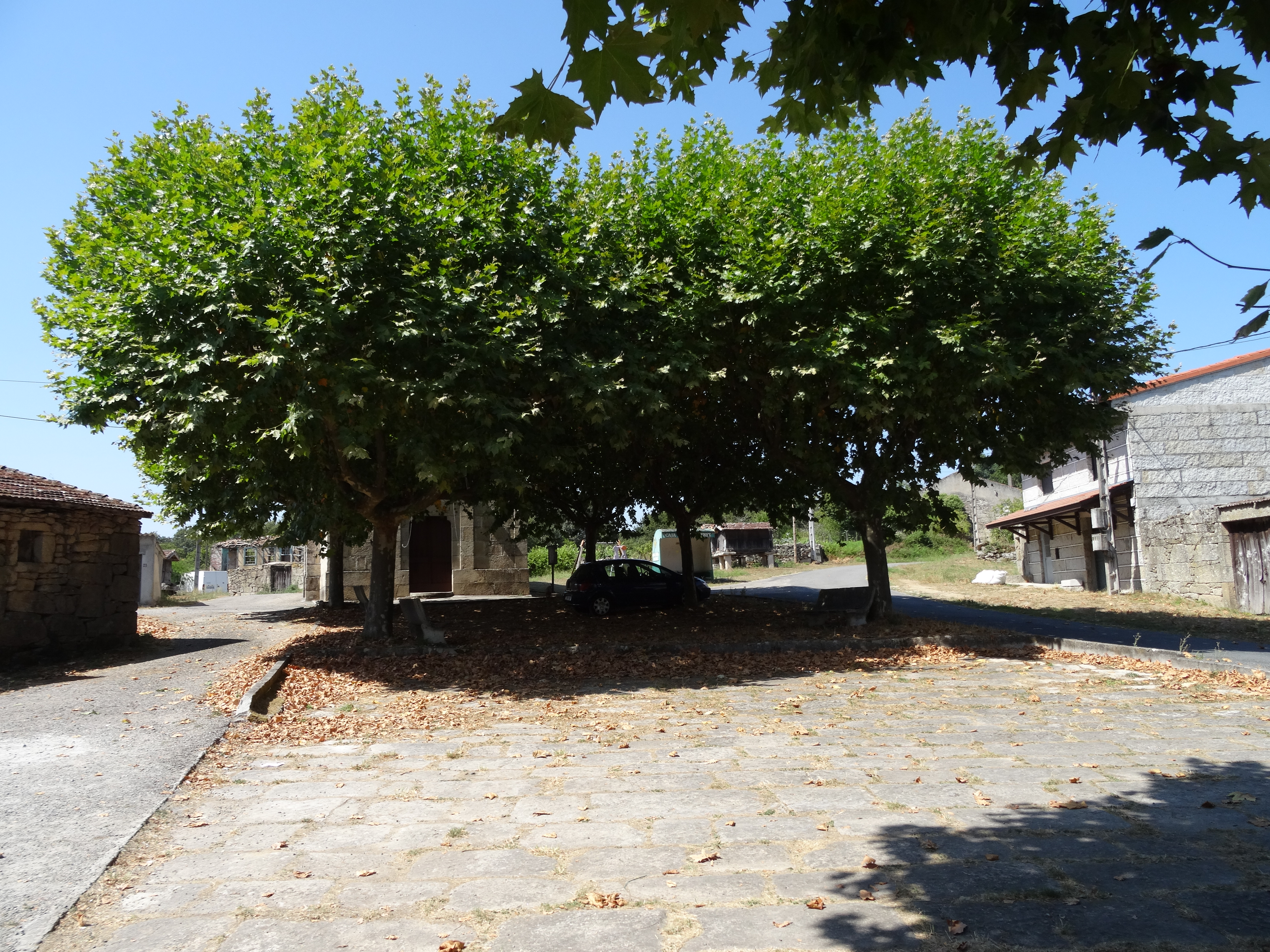 Ver título.